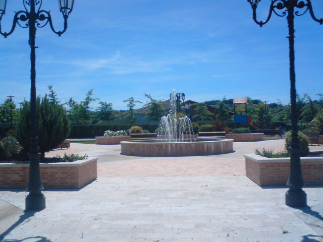 Place du village de Estillac